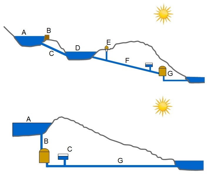 Main arrangement for an underground Hydroelectric Power Station. Design of the tunnels is a choice that has to do with topology.